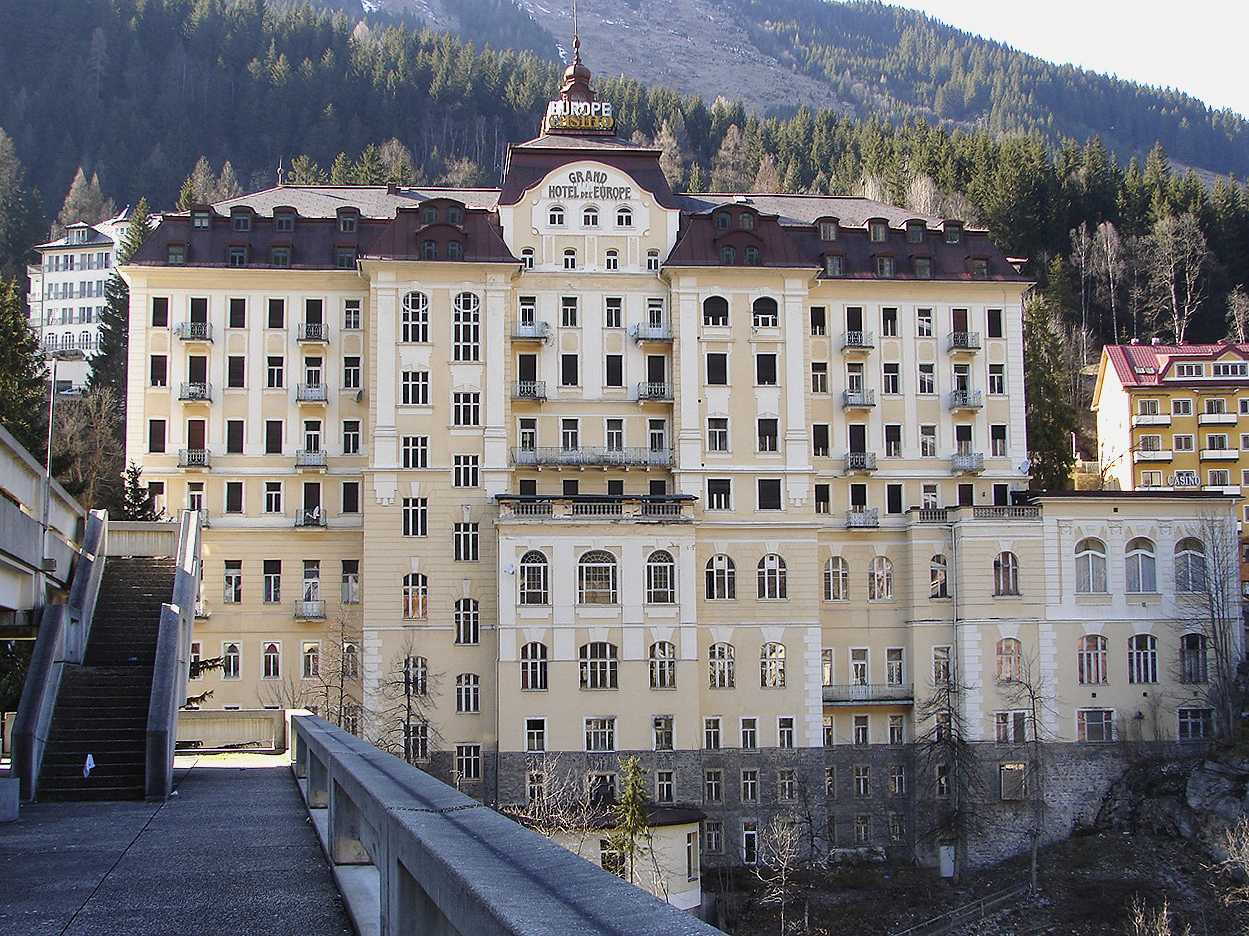 Grand Hotel de l'Europe in Bad Gastein, Österreich, Stand: Februar 2007